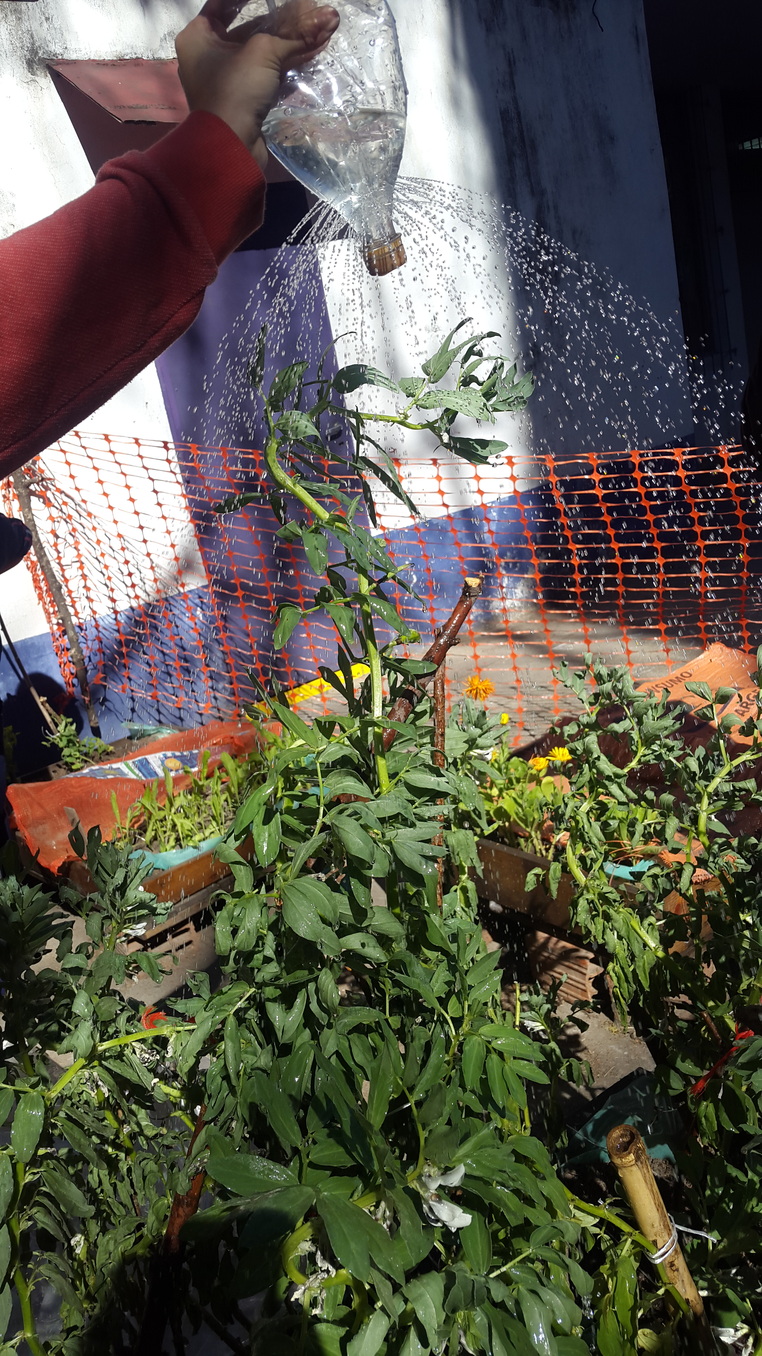 Las habas en pleno riego en nuestra huerta organica y educativa.